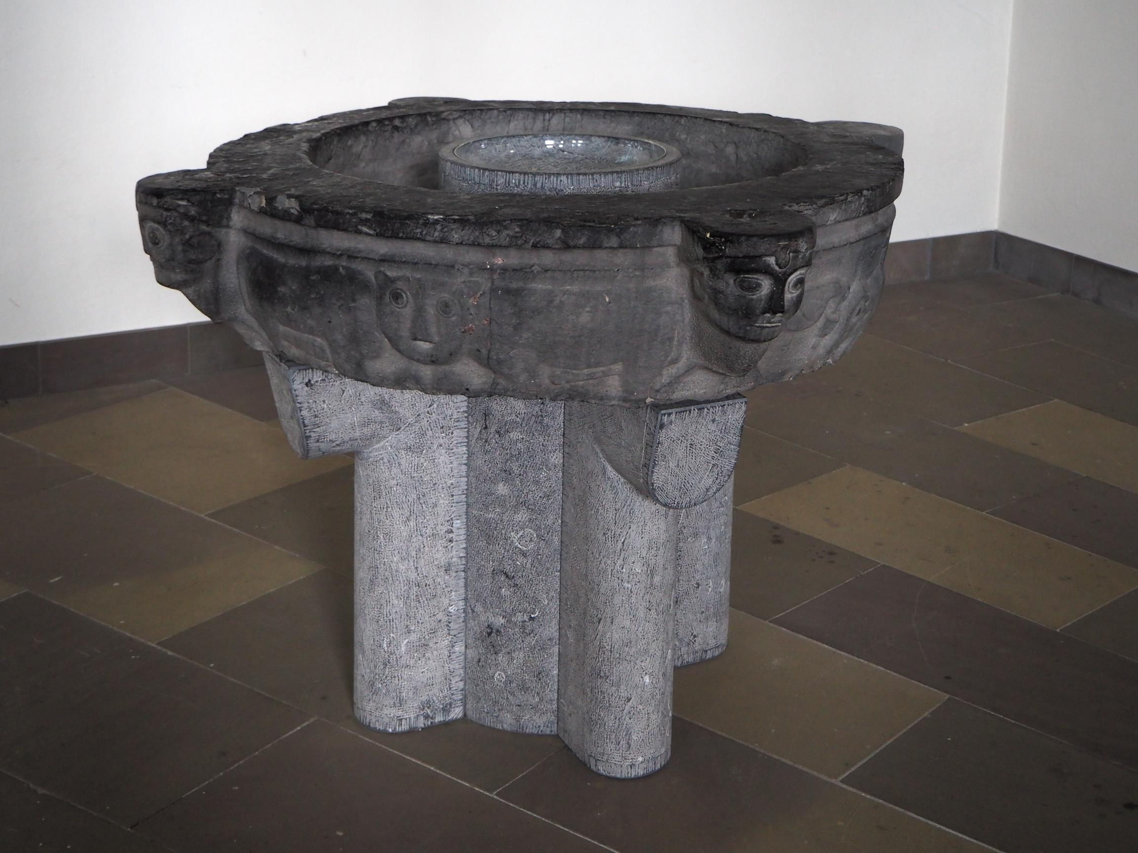 Wermelskirchen (NRW),Evangelische Stadtkirche, Taufstein (um 1180), Foto: Juli 2015